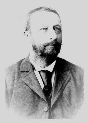 Cserni Béla régész, a gyulafehérvári ásatások kezdeményezője